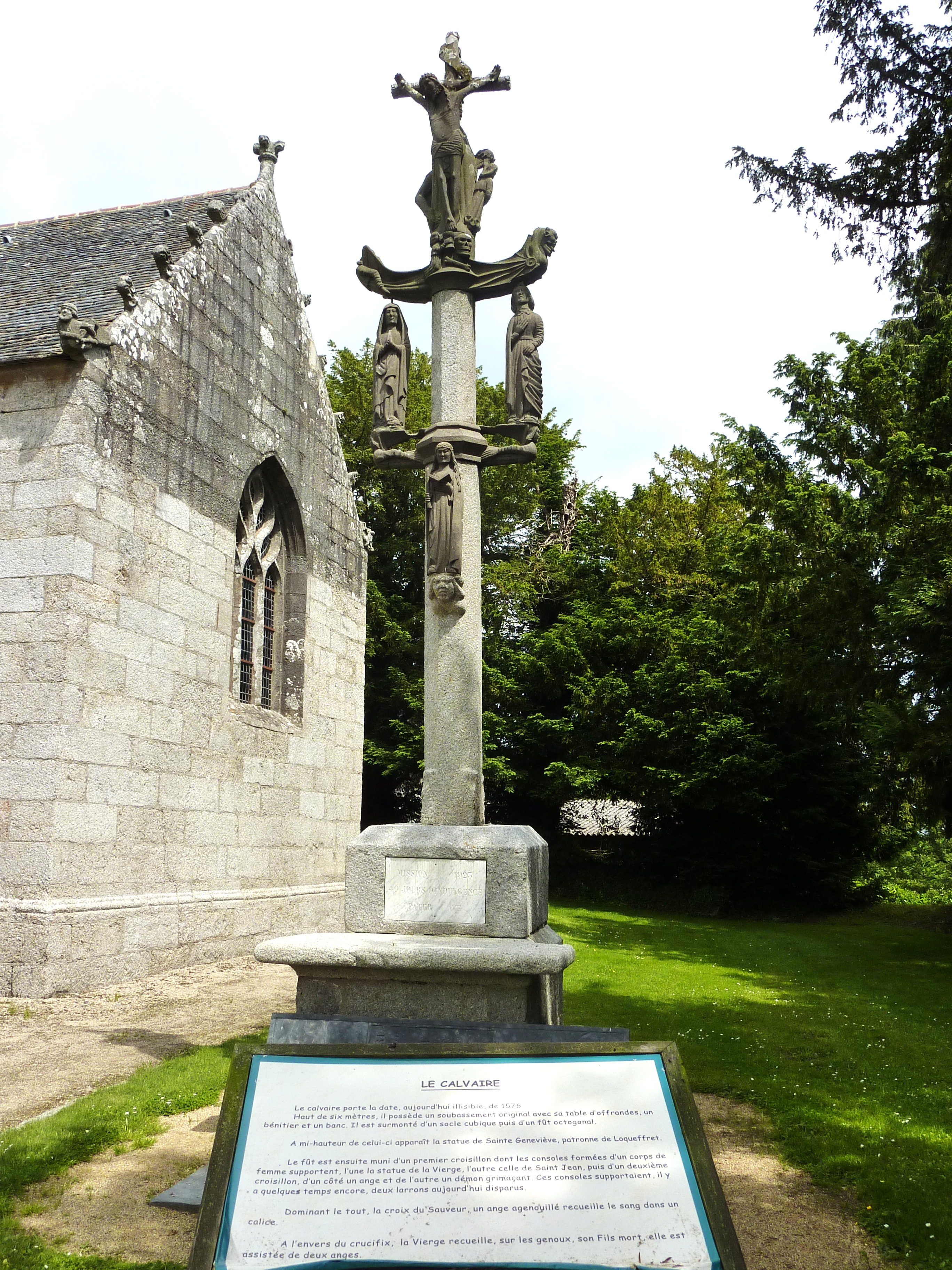 Loqueffret: le calvaire de l'enclos paroissial (fin XVème siècle)